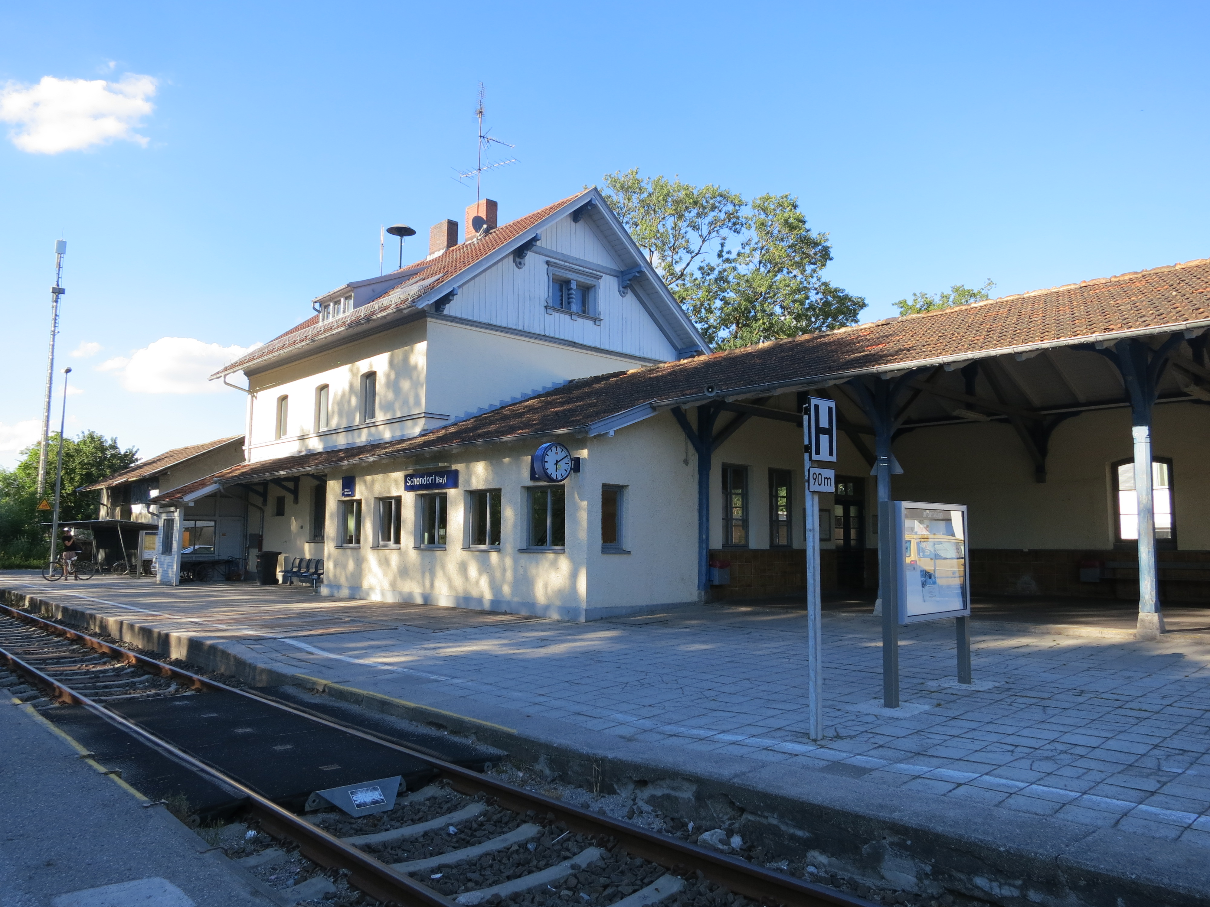 Empfangsgebäude und offene Wartehalle des Bahnhofs Schondorf (Bay) von der Gleisseite